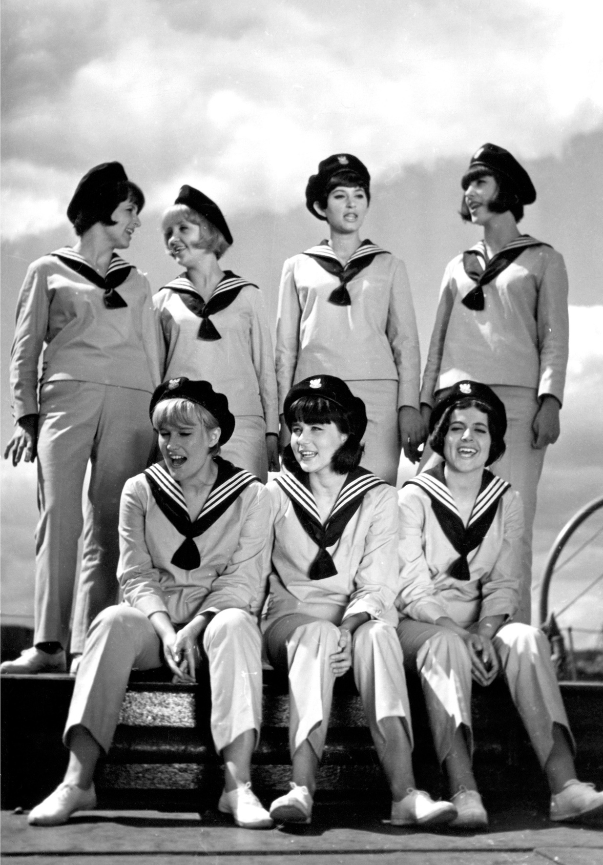 Zespół wokalny Filipinki podczas zdjęć do filmu „Marynarka to męska przygoda” wiosną 1966 roku.